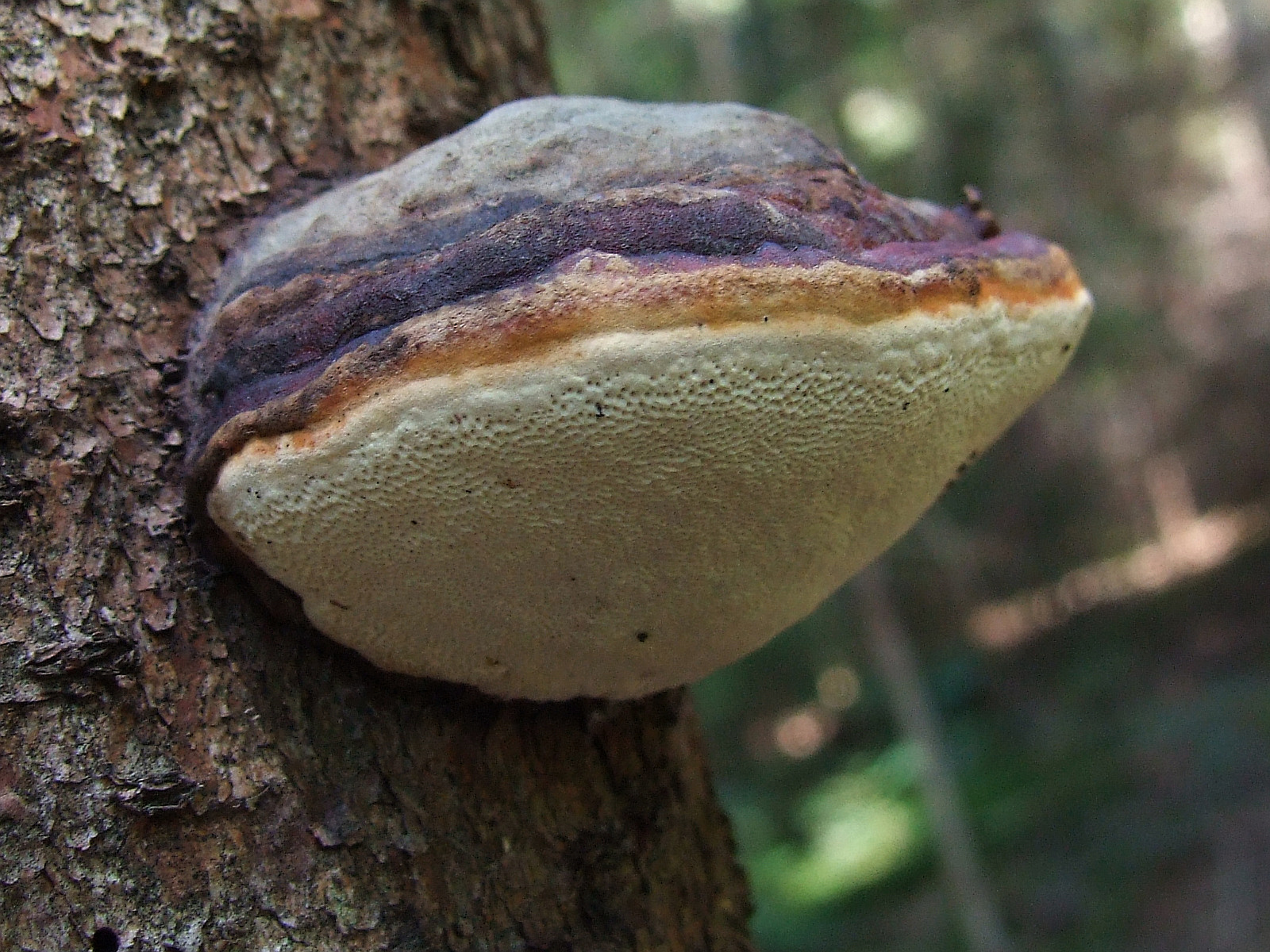 Fomitopsis pinicola